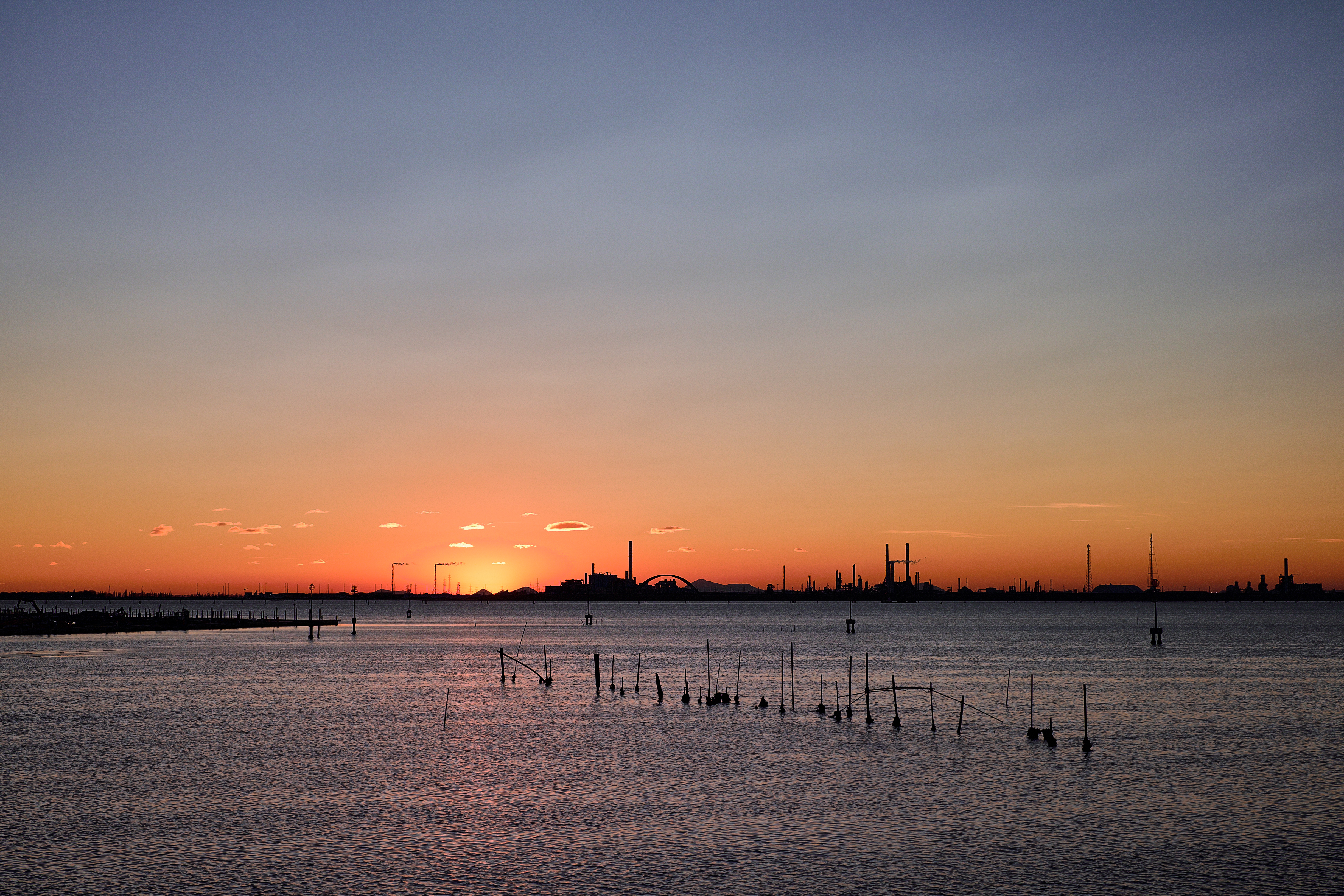 Tramonto a Venezia